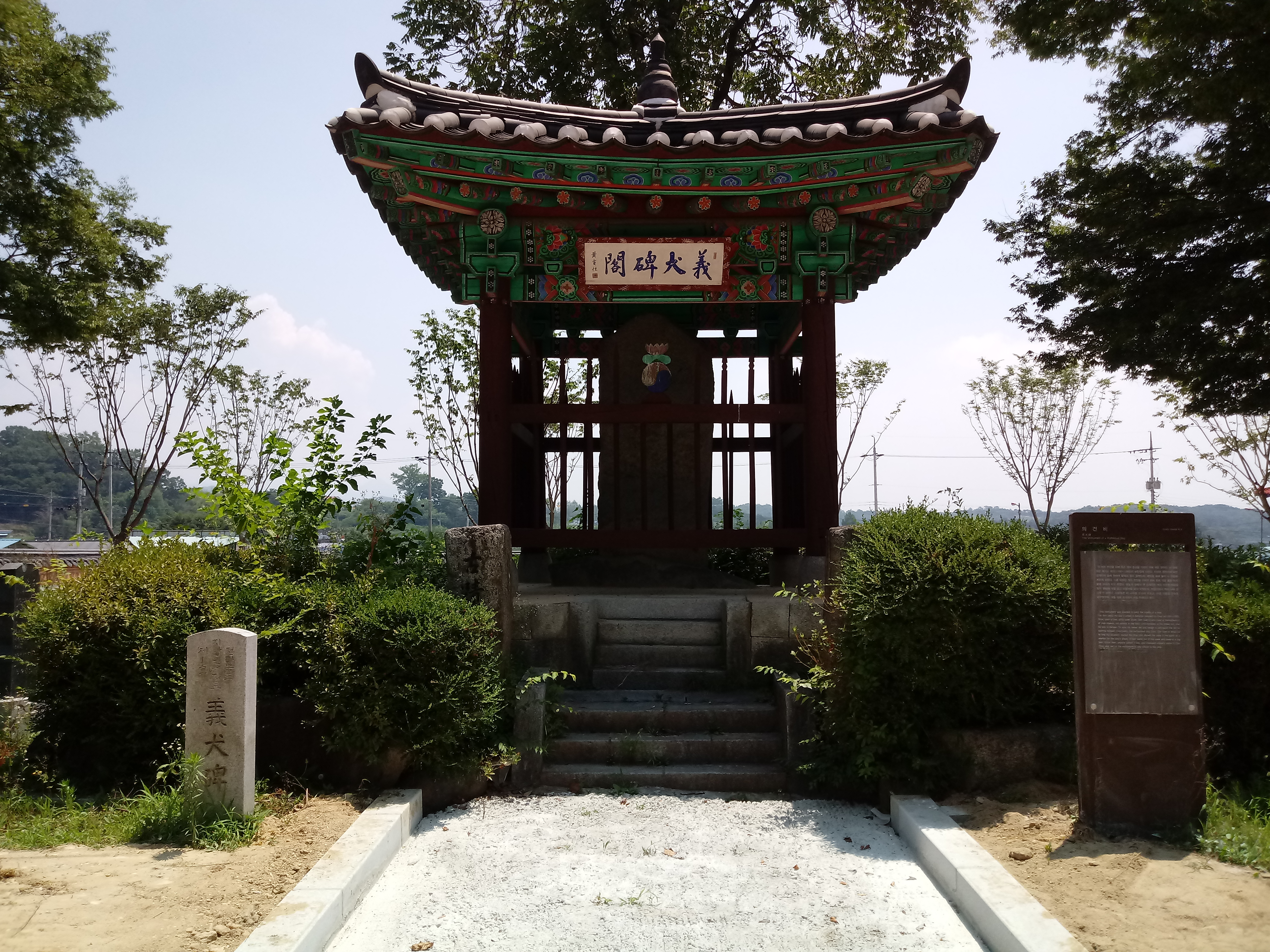 오수 의견